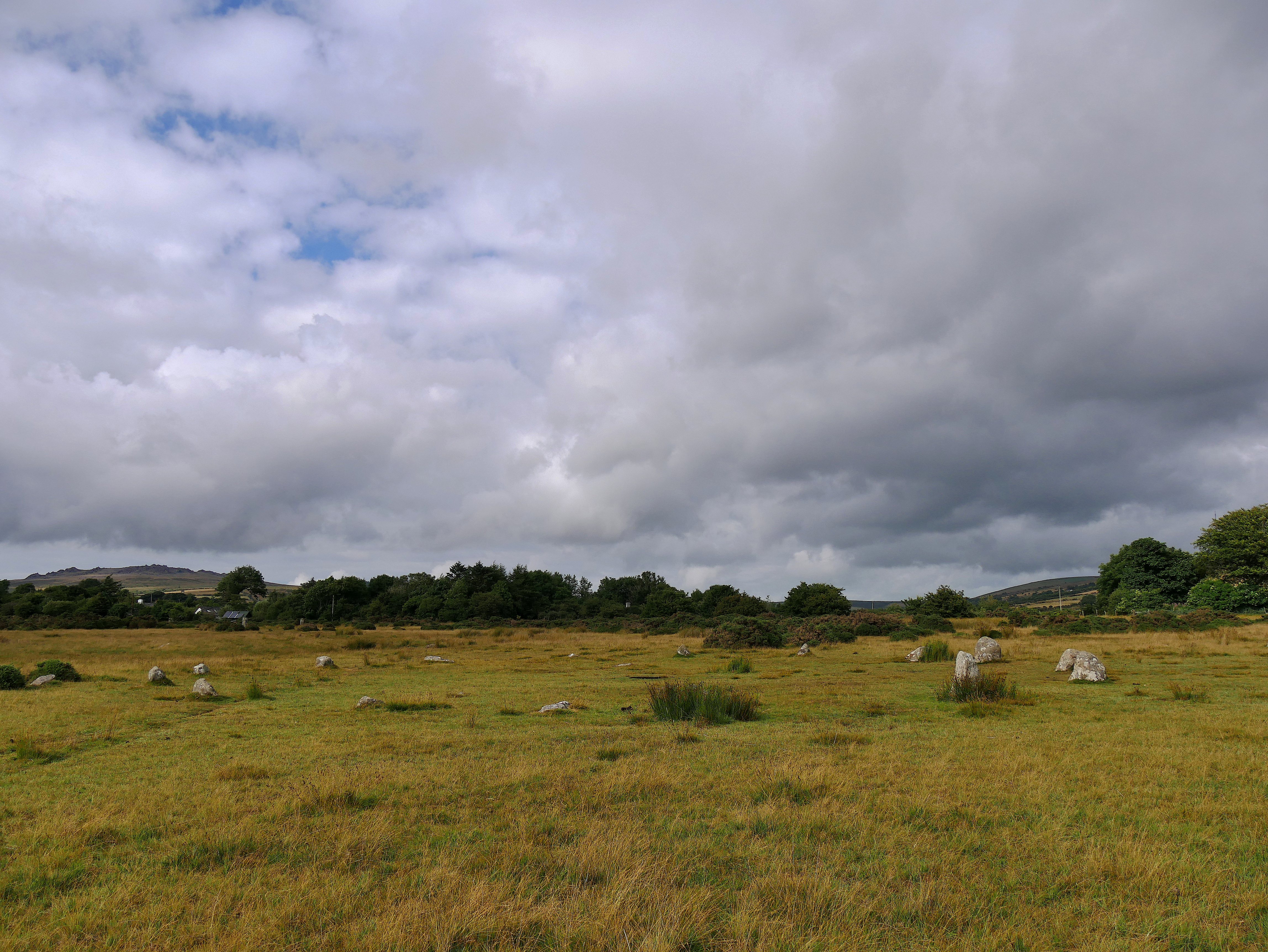 Gors Fawr Stone Circle near Mynachlog Ddu.